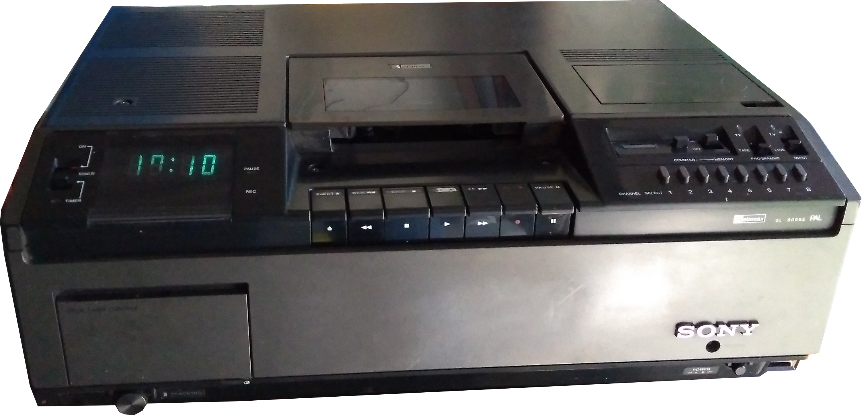 Foto eines Sony Betamax Sl-8000E Videorekorder. Dieser wurde 1979 in Deutschland gekauft. Der Sl-8000E ist der erste Betamax Rekorder der in Deutschland erworben werden konnte.